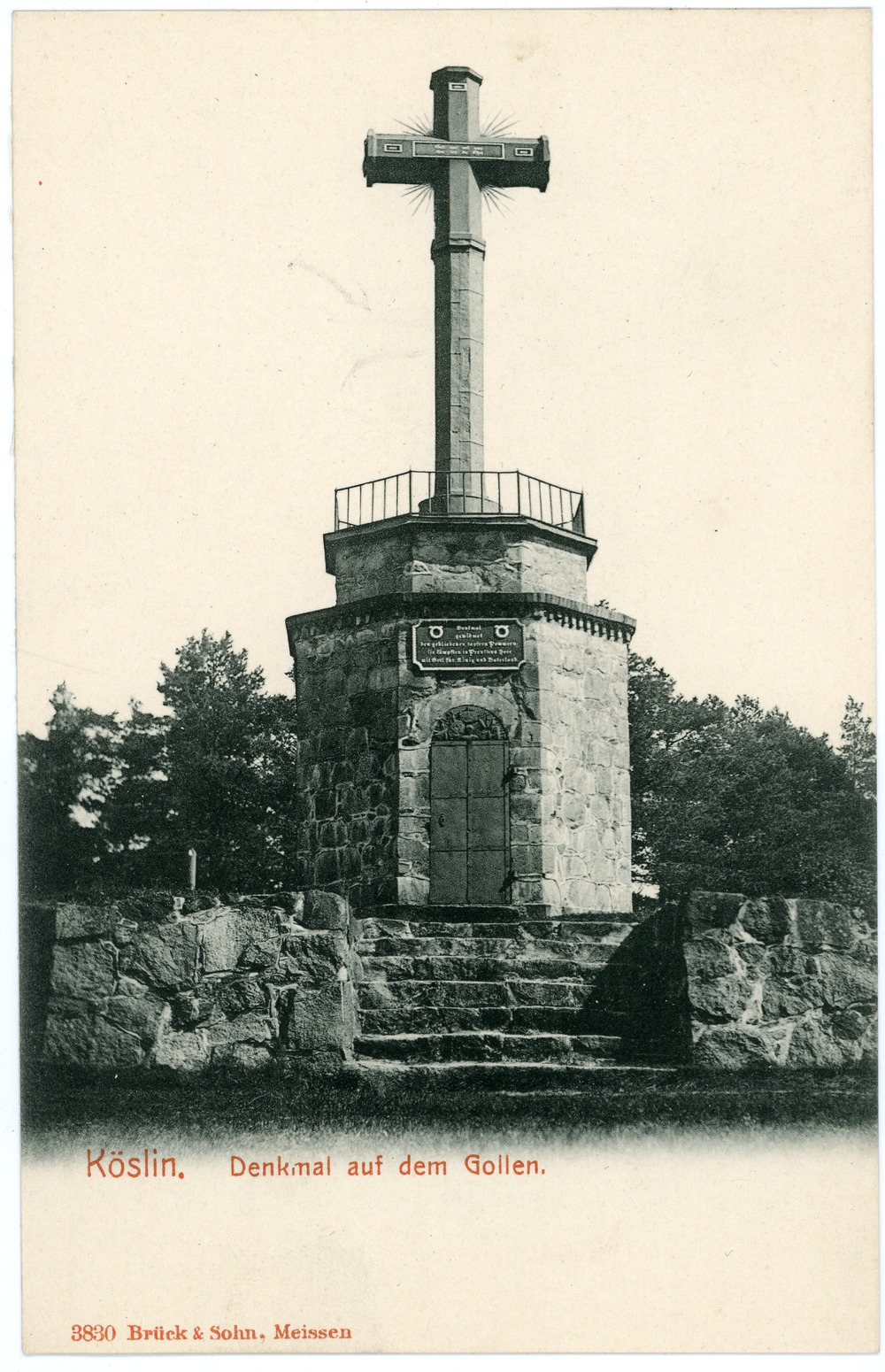 Köslin; Denkmal auf dem Gollen für die gefallenen Hinterpommern 1813–1815, erbaut 1828 This postcard is from publisher Brück & Sohn in Meißen ( postcard has a unique number 03830 and is available in a higher resolution at the publisher. This images was uploaded in a cooperation project between Wikipedians and the publisher.